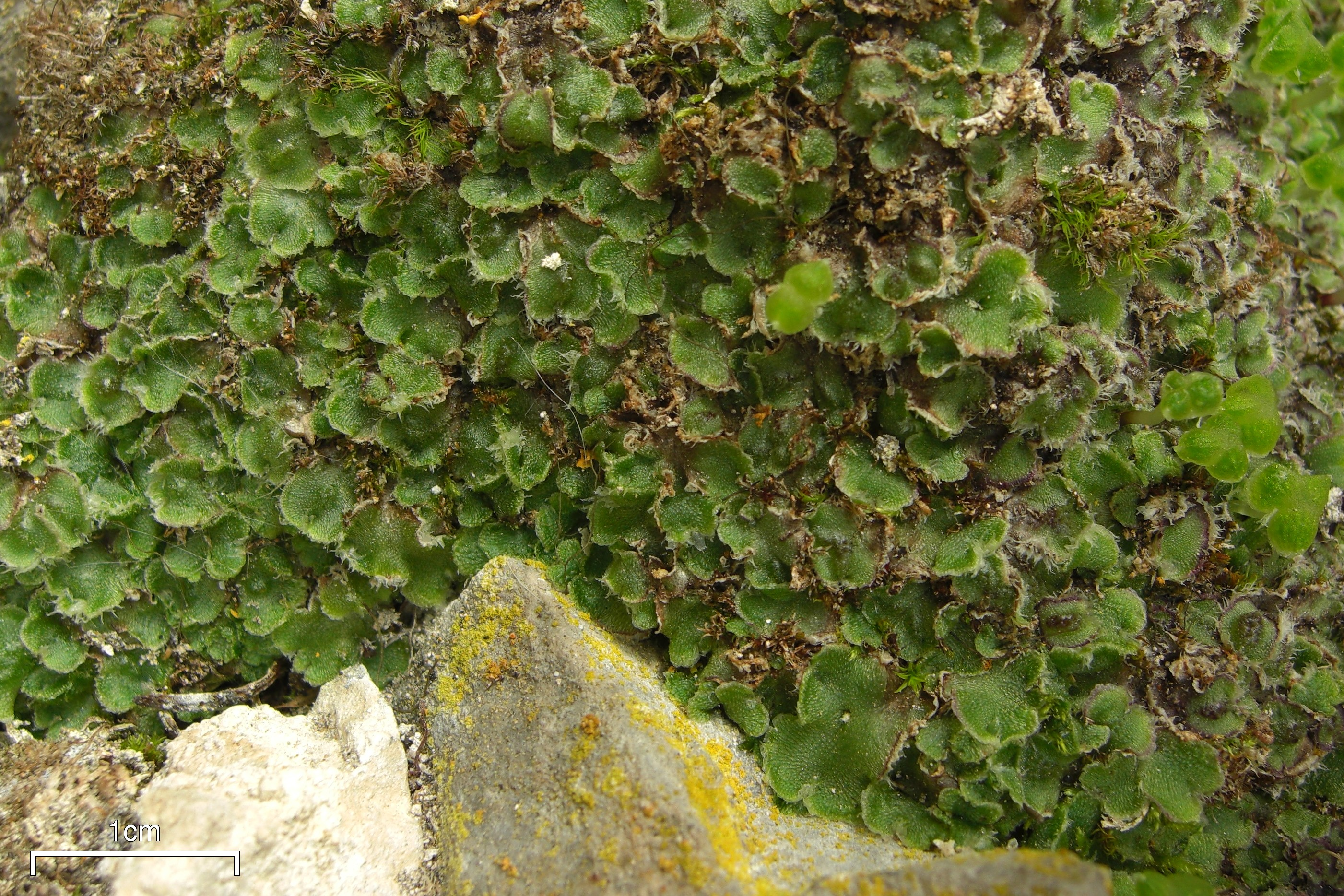 Athalamia hyalina 20090528.3 Vavenby, BC